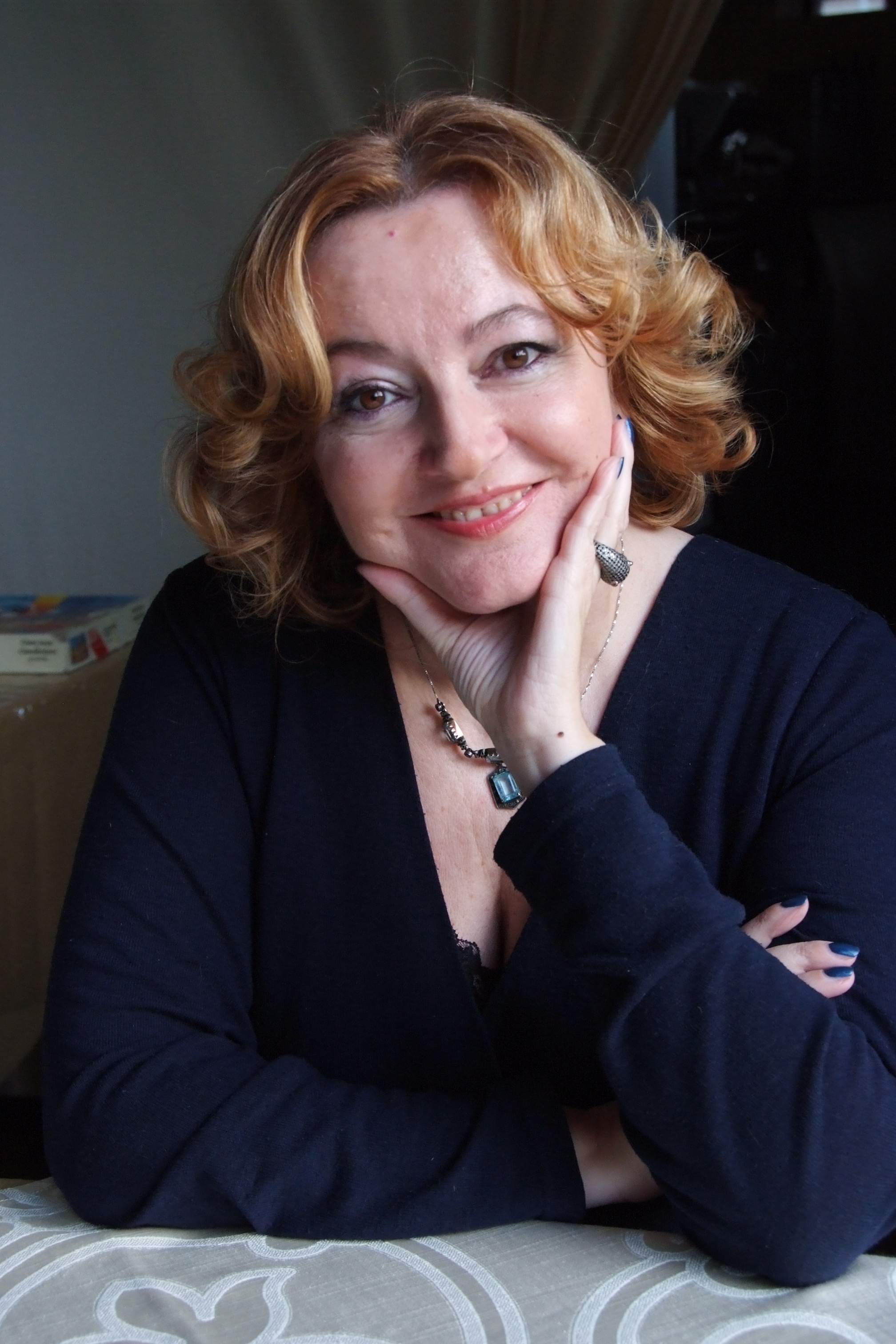 Bianca Garavelli, scrittrice, dantista, critica letteraria